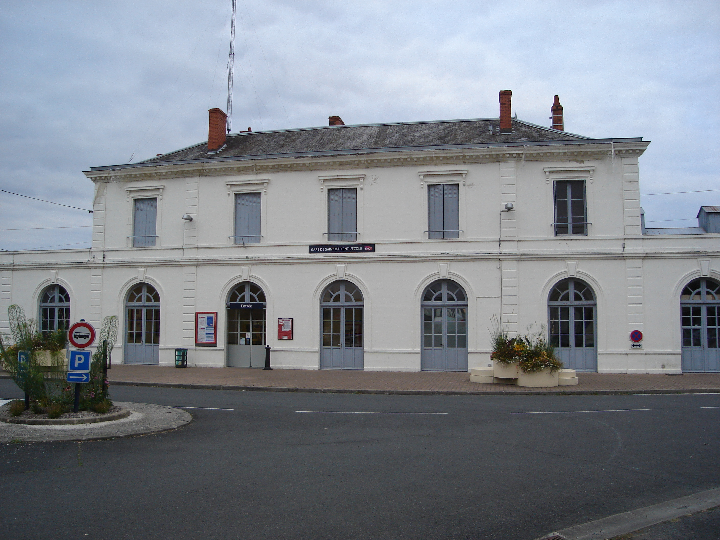 Gare de Saint-Maixent-l'École dans les Deux-Sèvres.